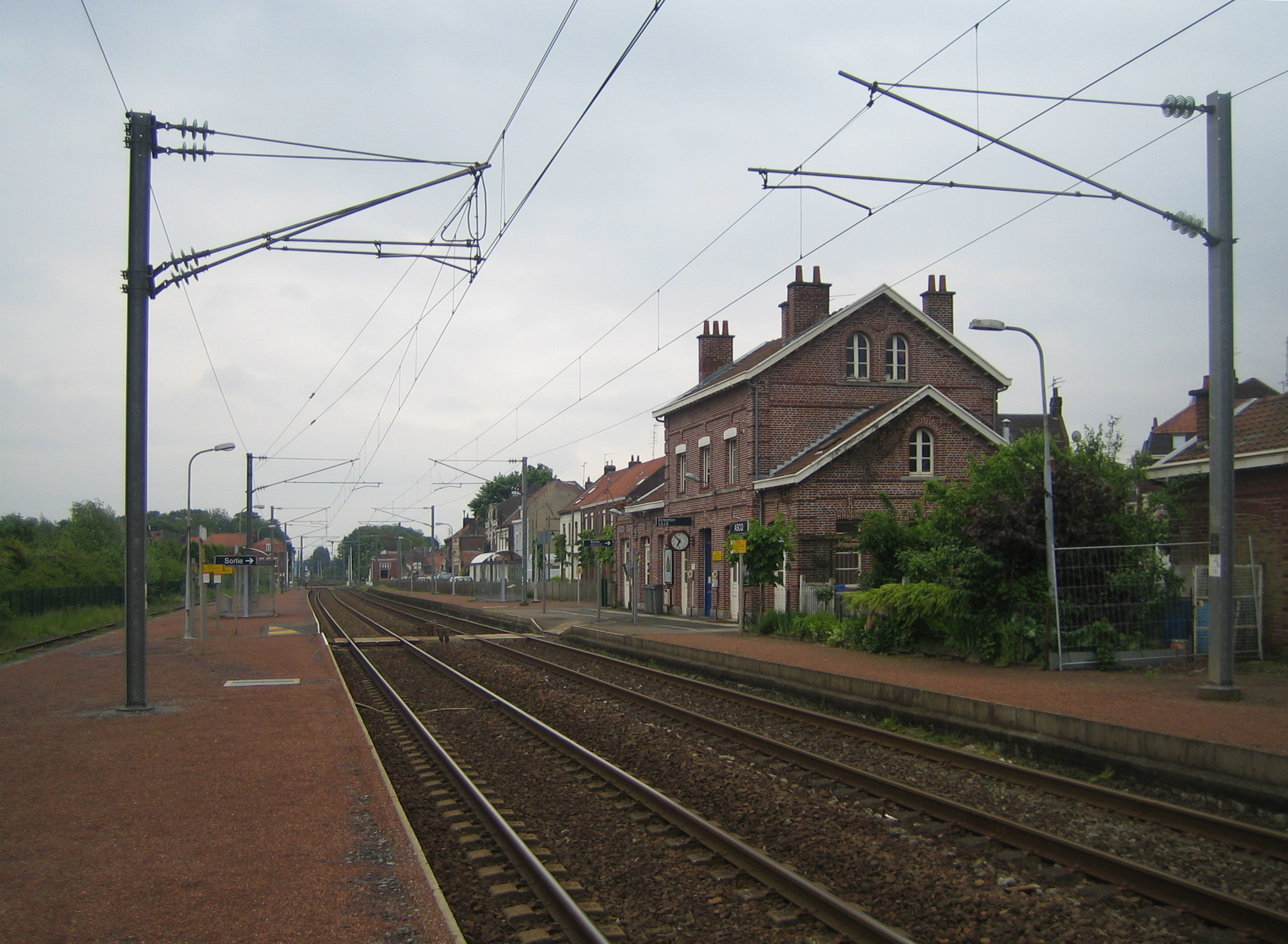 Gare d'Ascq, 2006.